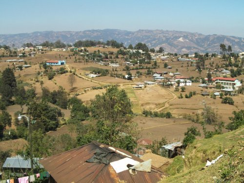 Vista panoramica de la aldea desde el Mirador